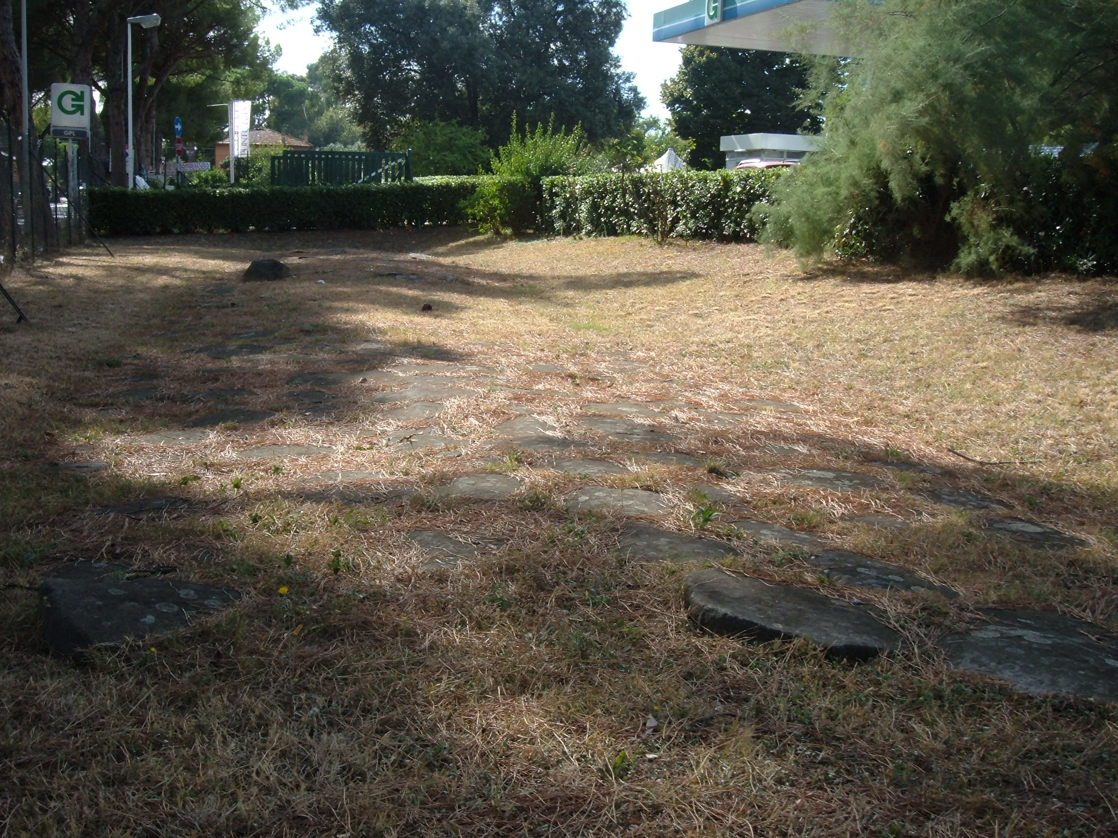 Resti del tracciata antico della via Nomentana, in località Sant'Alessandro.